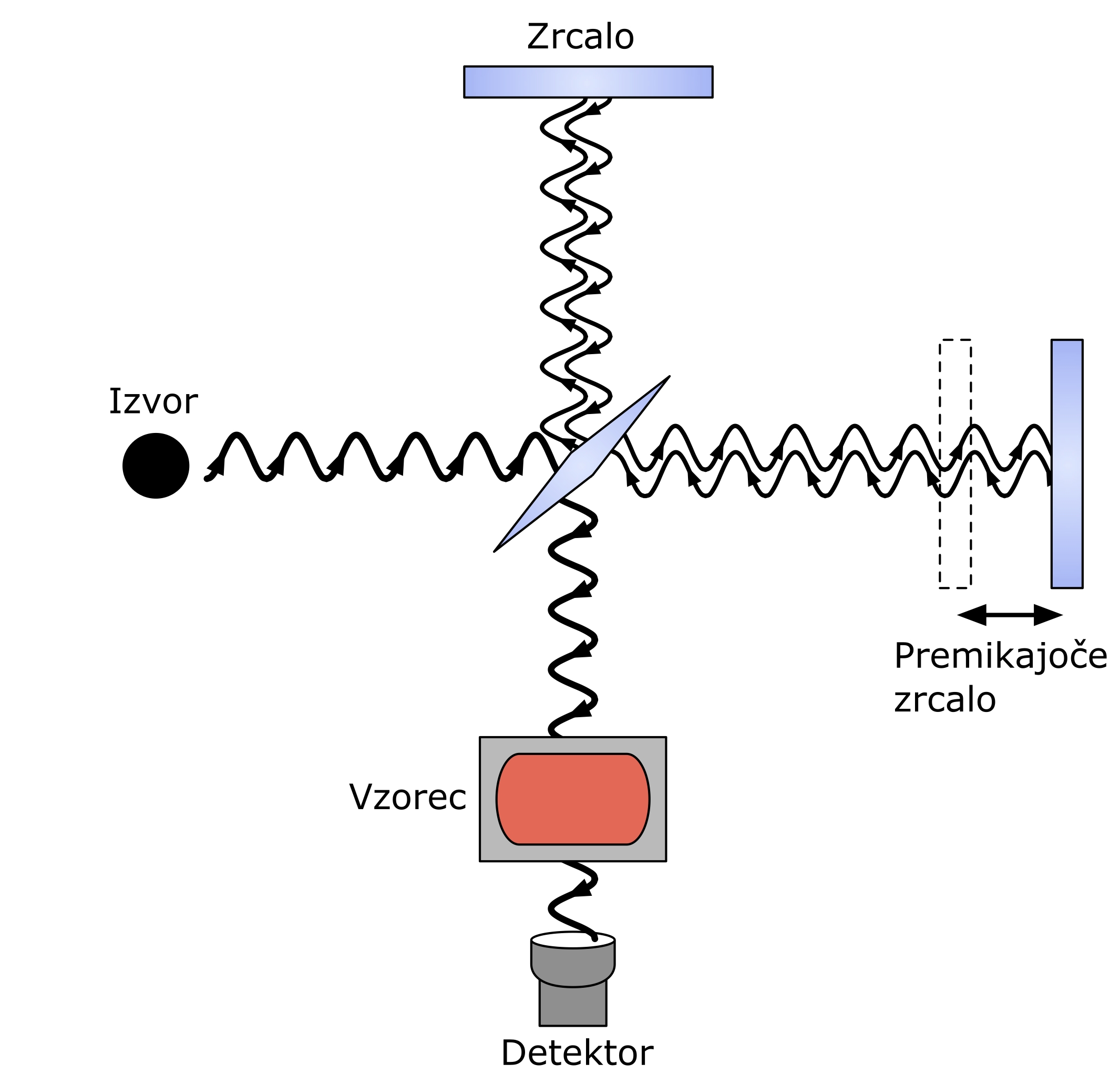 Slika prikazuje FTIR